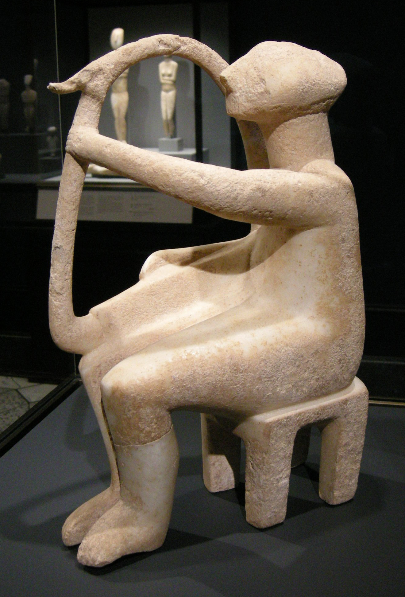 Arte cicladica, periodo primitivo, suonatore d'arpa, 2700-2300 ac.